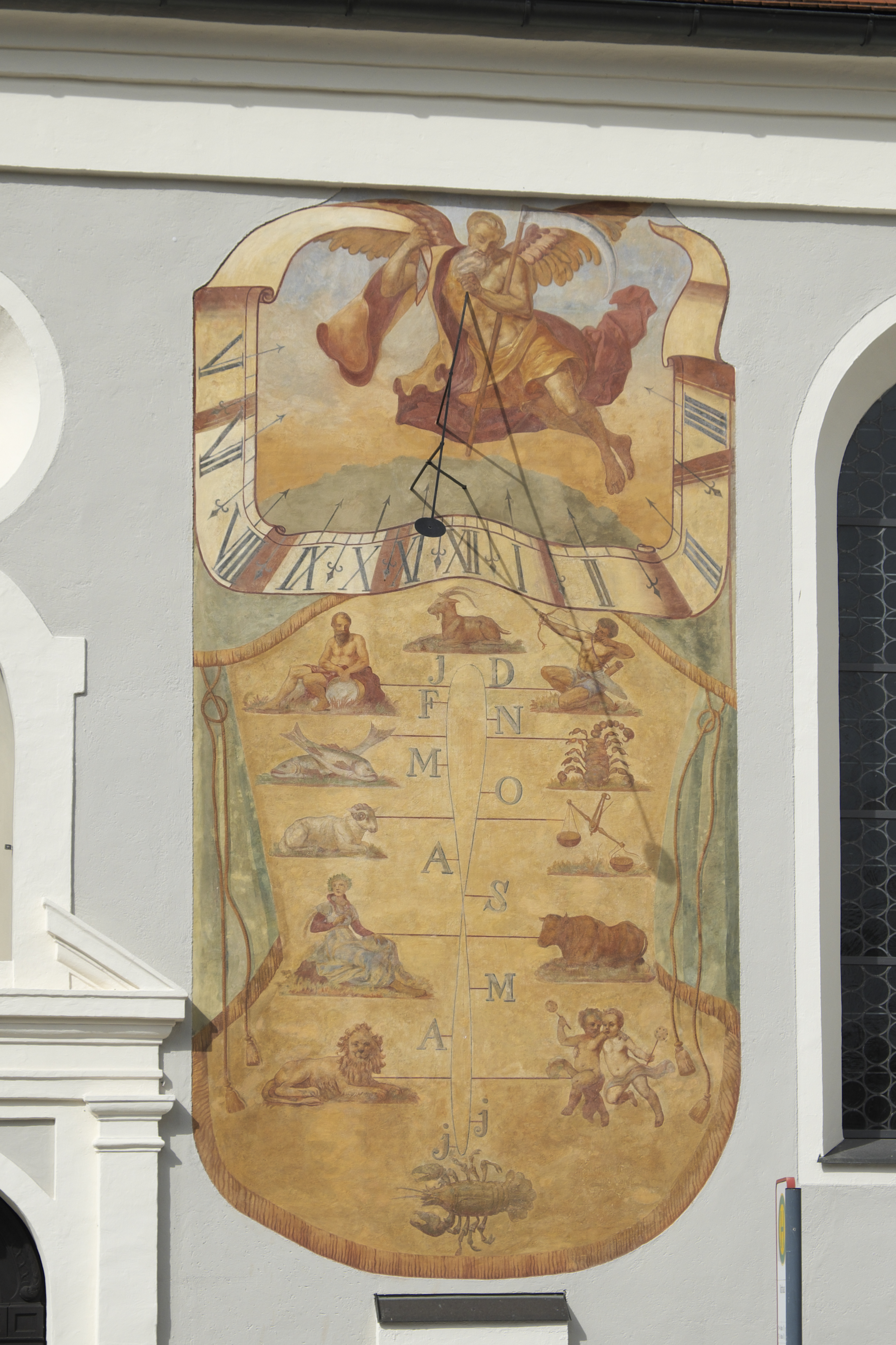 Katholische Pfarrkirche St. Jakob in Dachau (Bayern, Deutschland), Südseite mit Sonnenuhr von 1699